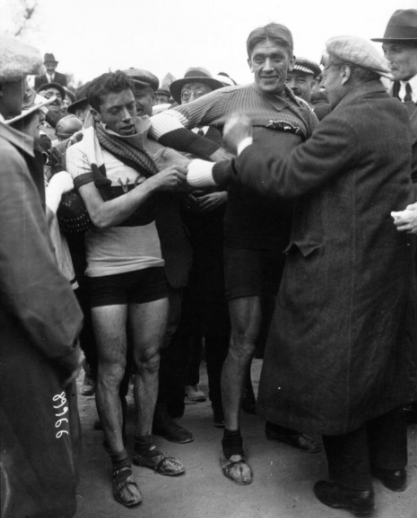 Championnat de France des 100 kms : Francis Pelissier et Grassin revêtent le maillot tricolore en 1921.